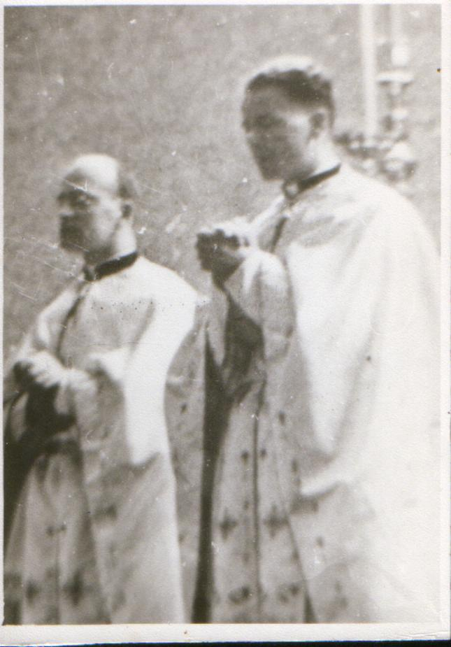 Aurel lelutiu si Cardinalul Todea